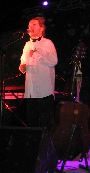 Pierre Vassiliu en concert à Cambieure